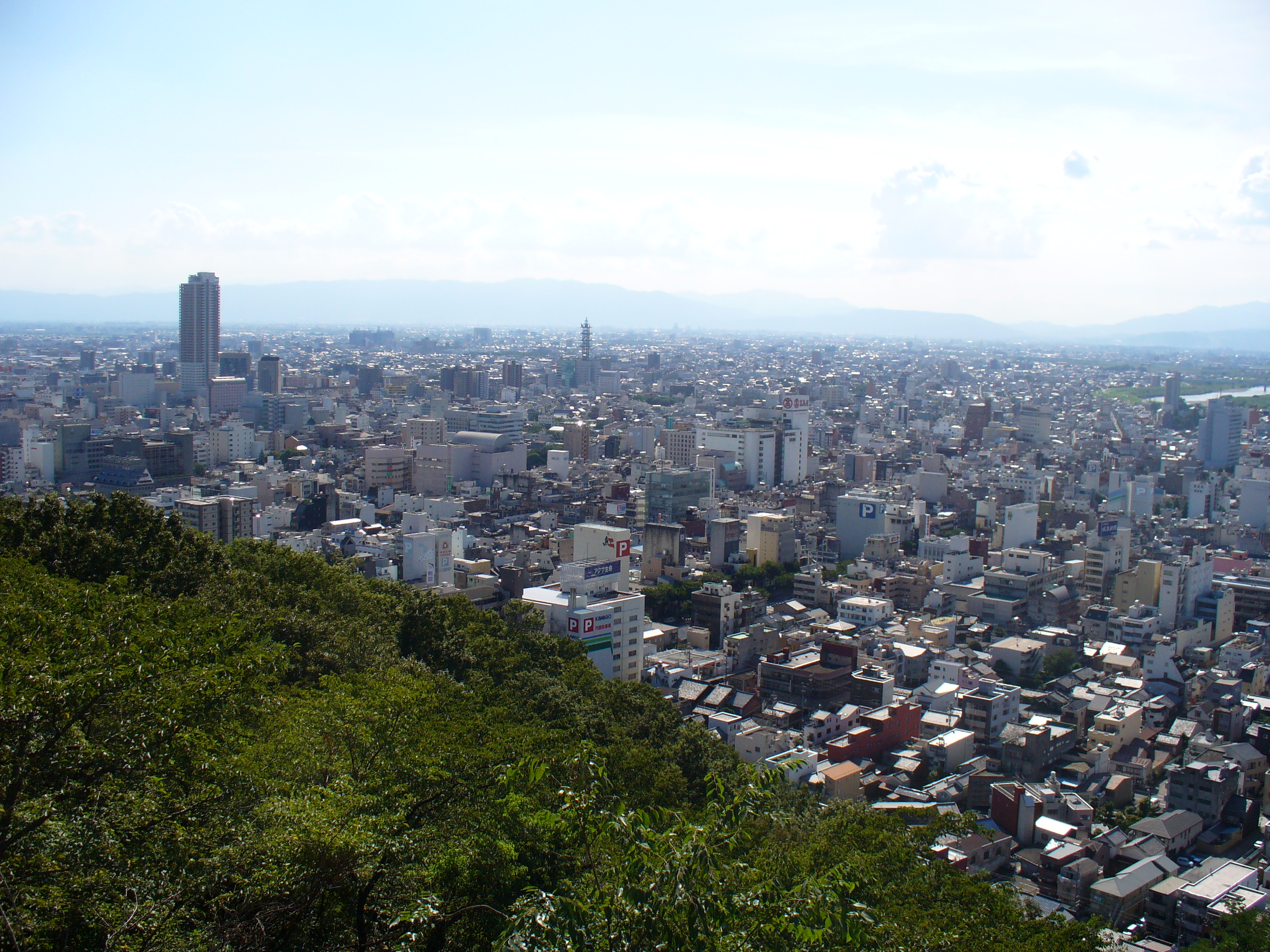 Gifu City（岐阜市）、Gifu,Gifu(岐阜県岐阜市)で撮影。Mt.Kinka Driveway（金華山ドライブウェイ）の金華山展望台より。